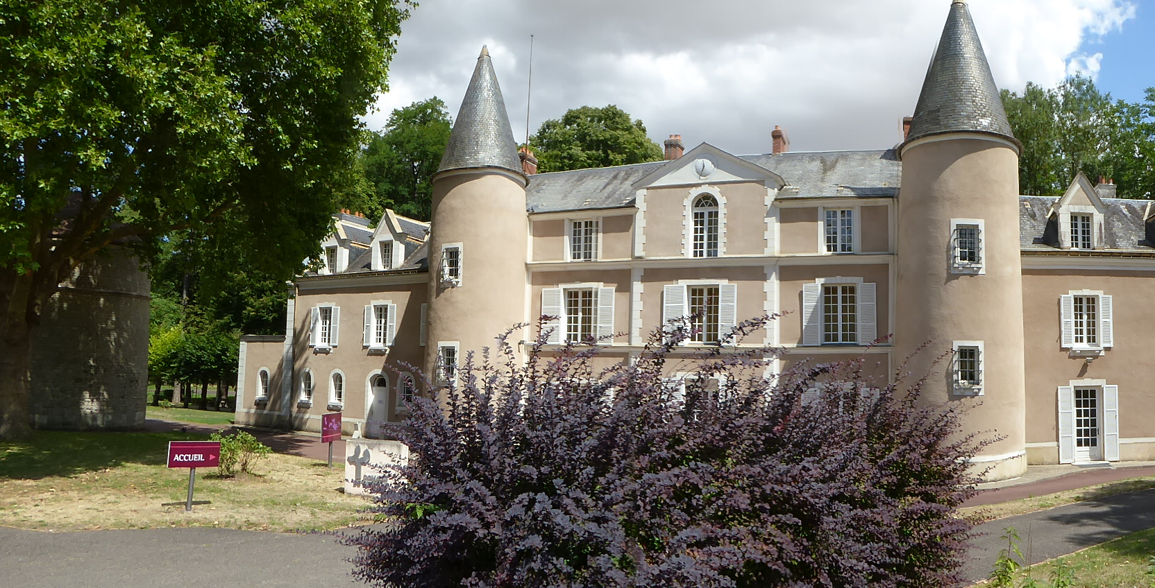 Château de Bierville